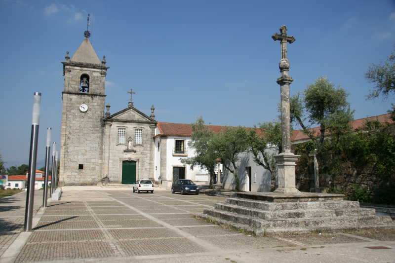 Mosteiro de São João de Arnóia